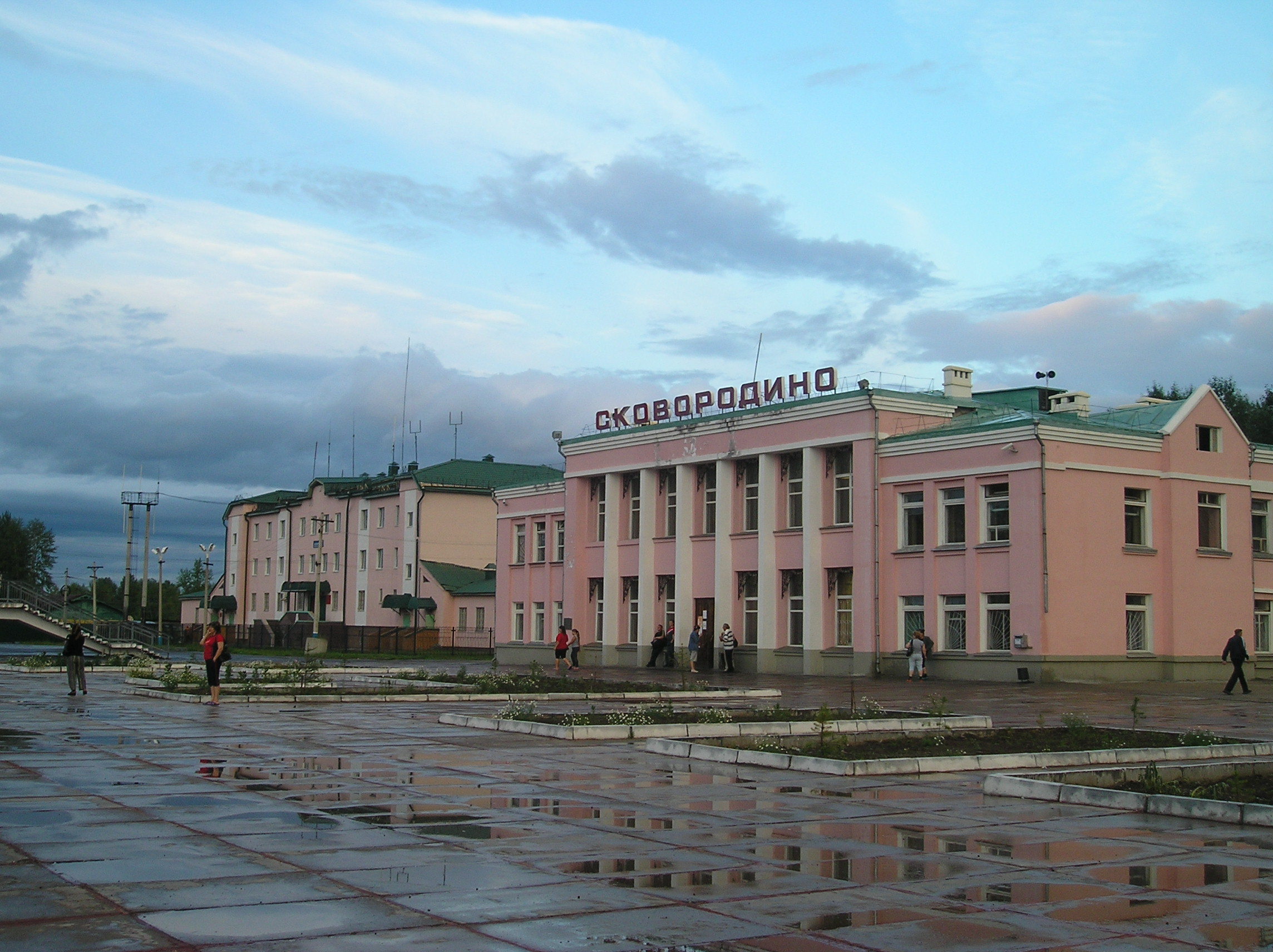 Вокзал города Сковородино